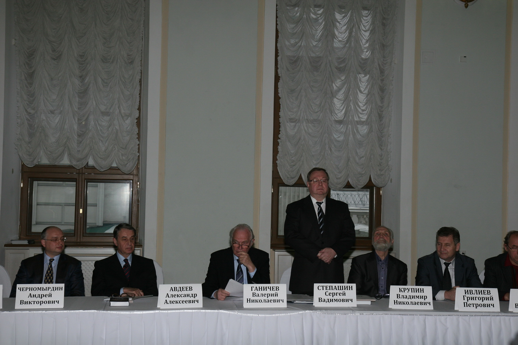 1-го декабря 2011 года в Российской Государственной библиотеке («Дом Пашкова») состоялась торжественная церемония вручения Большой литературной премии России за 2011 год